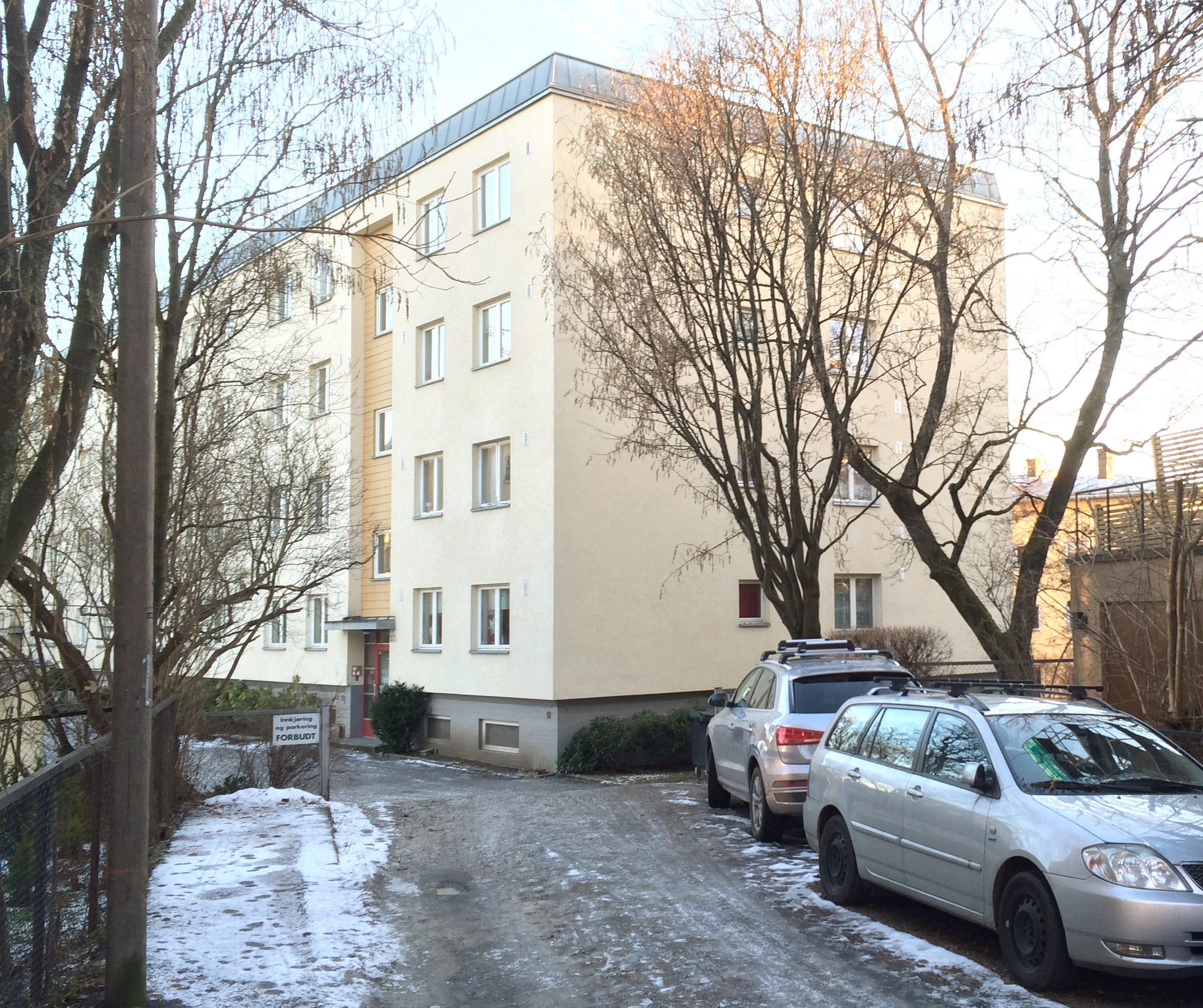 En liten rest av Cathinka Guldbergs vei mellom Anton Schjøths gate og Vallegata